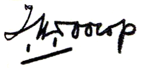 Signature of the artist Jan Toorop (1858-1928)